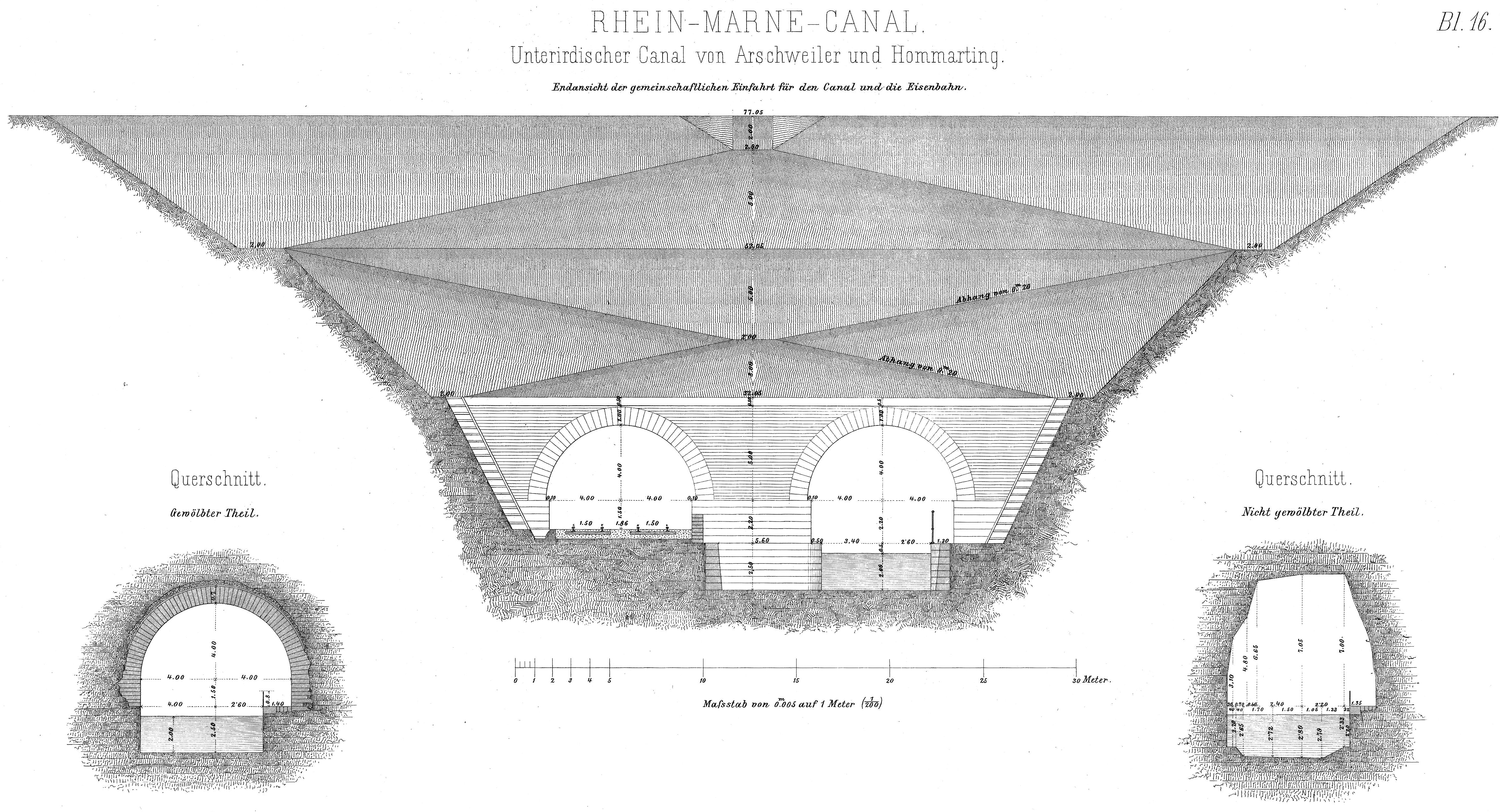 Rhein-Marne-Kanal, Unterirdischer Kanal von Arschweiler und Hommarting, Schnitte